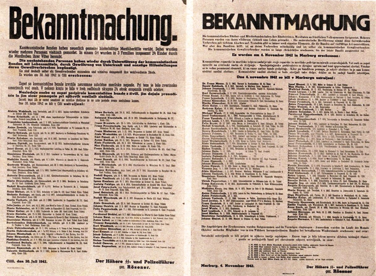 Razglas o ustrelitvi talcev v Mariboru